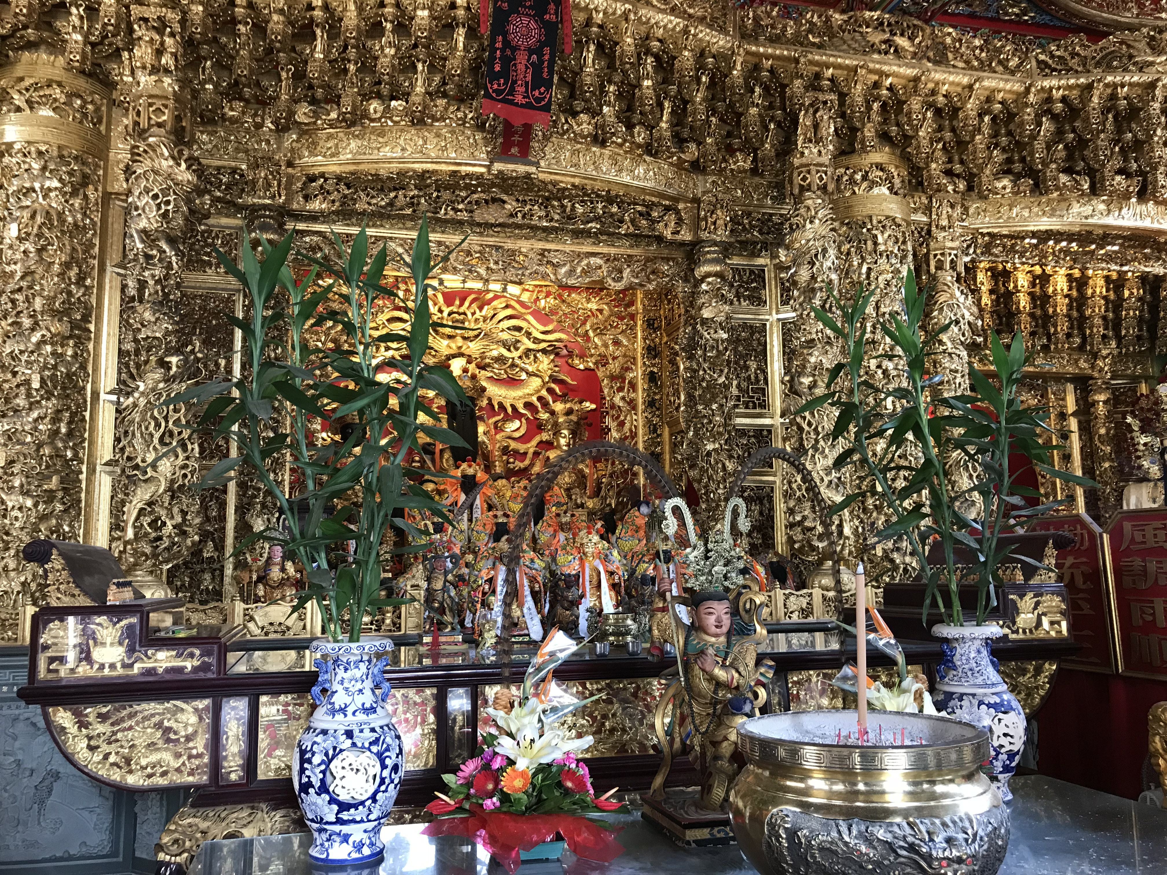 鹿港文德宮內部